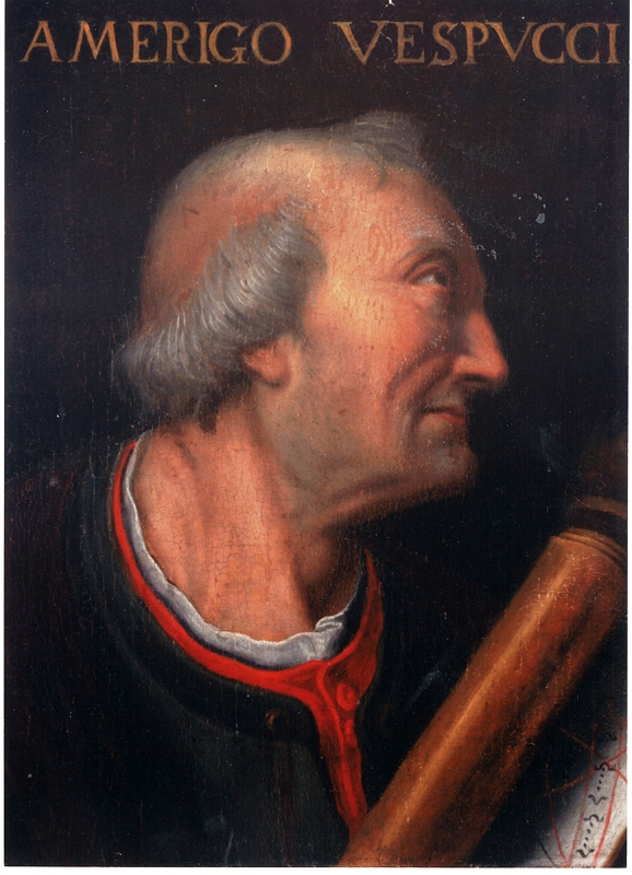 Portrait d'Amerigo Vespucci (1454-1512), huile sur bois originaire d'Italie